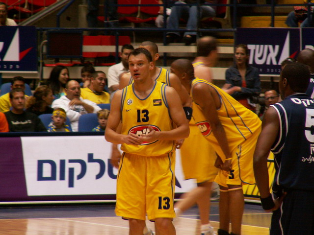 שארונאס (שאראס) יאסיקביציוס צולם על-ידי אבי קדמי This picture was taken by Avi Kedmi